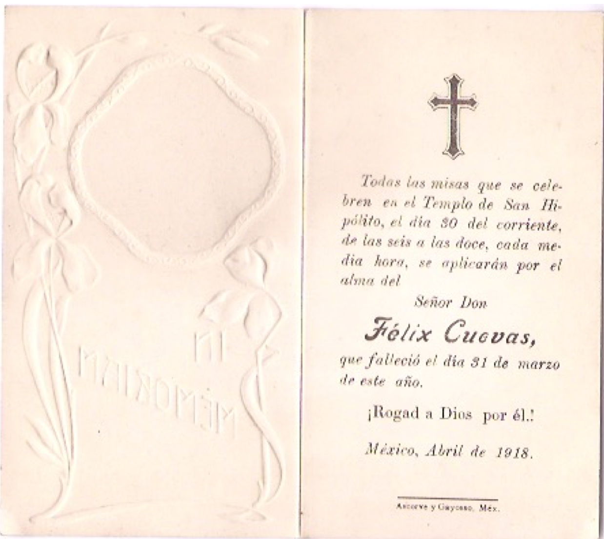 Texto del recordatorio para las misas del Sr Cuevas al mes de su fallecimiento